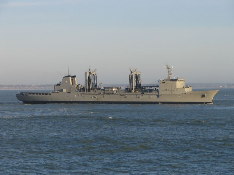 Buque Logísitico AOR, clase "Durance" (B-1) ARA "Patagonia" Martín Otero Near Mar del Plata. July, 2005